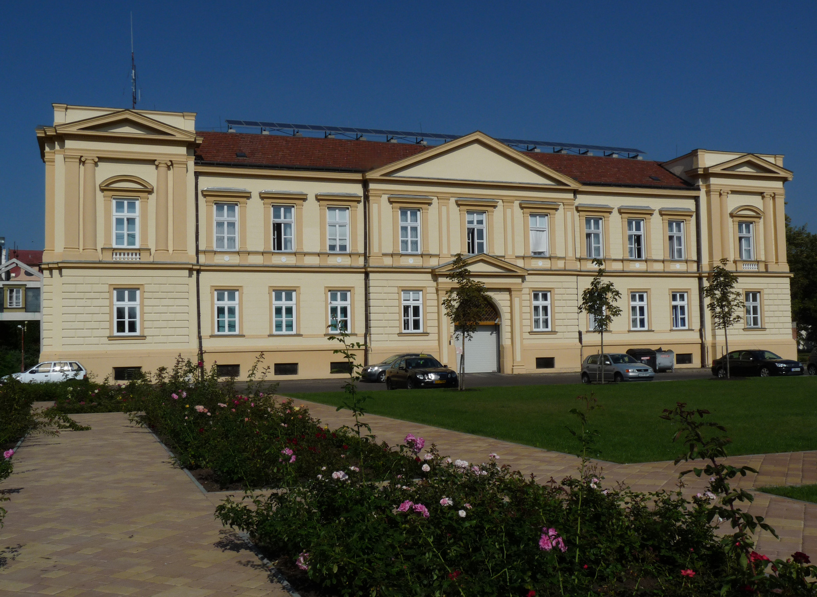 Megyeháza (Szolnok, Kossuth u. 2 .) This is a photo of a monument in Hungary, Identifier: 6046